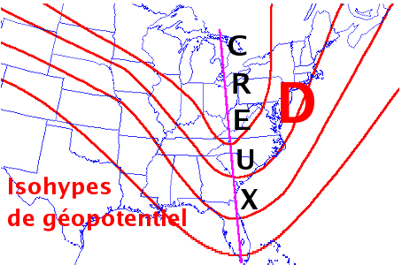 Image montrant un creux dans les isohypses de géopotentiel en altitude et la position d'une dépression sous celui-ci.